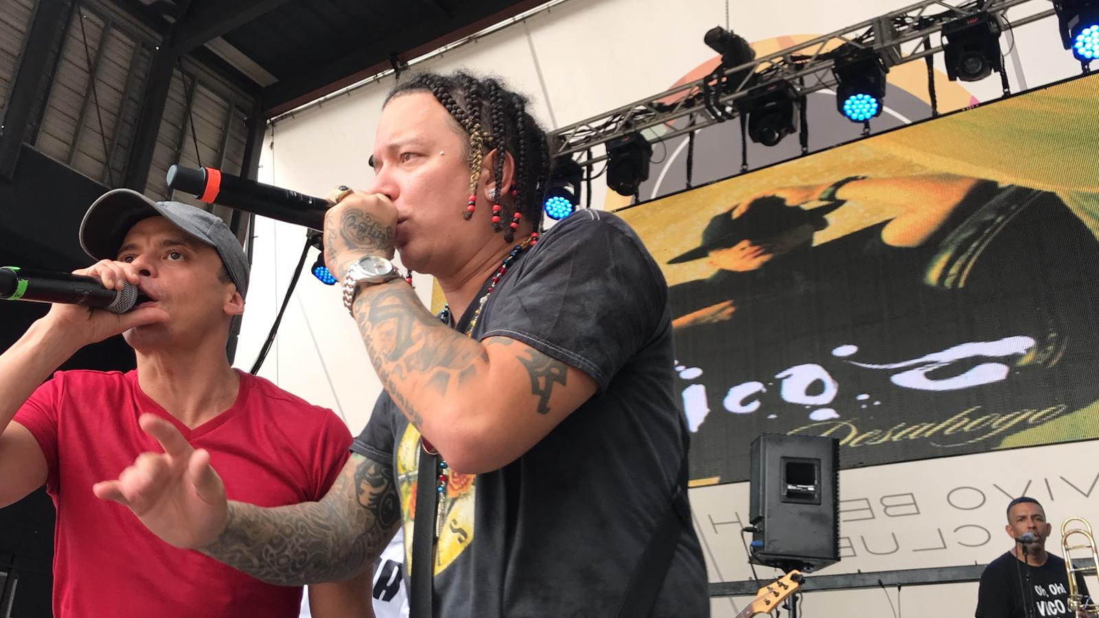 NK Profeta junto a Vico C en PR